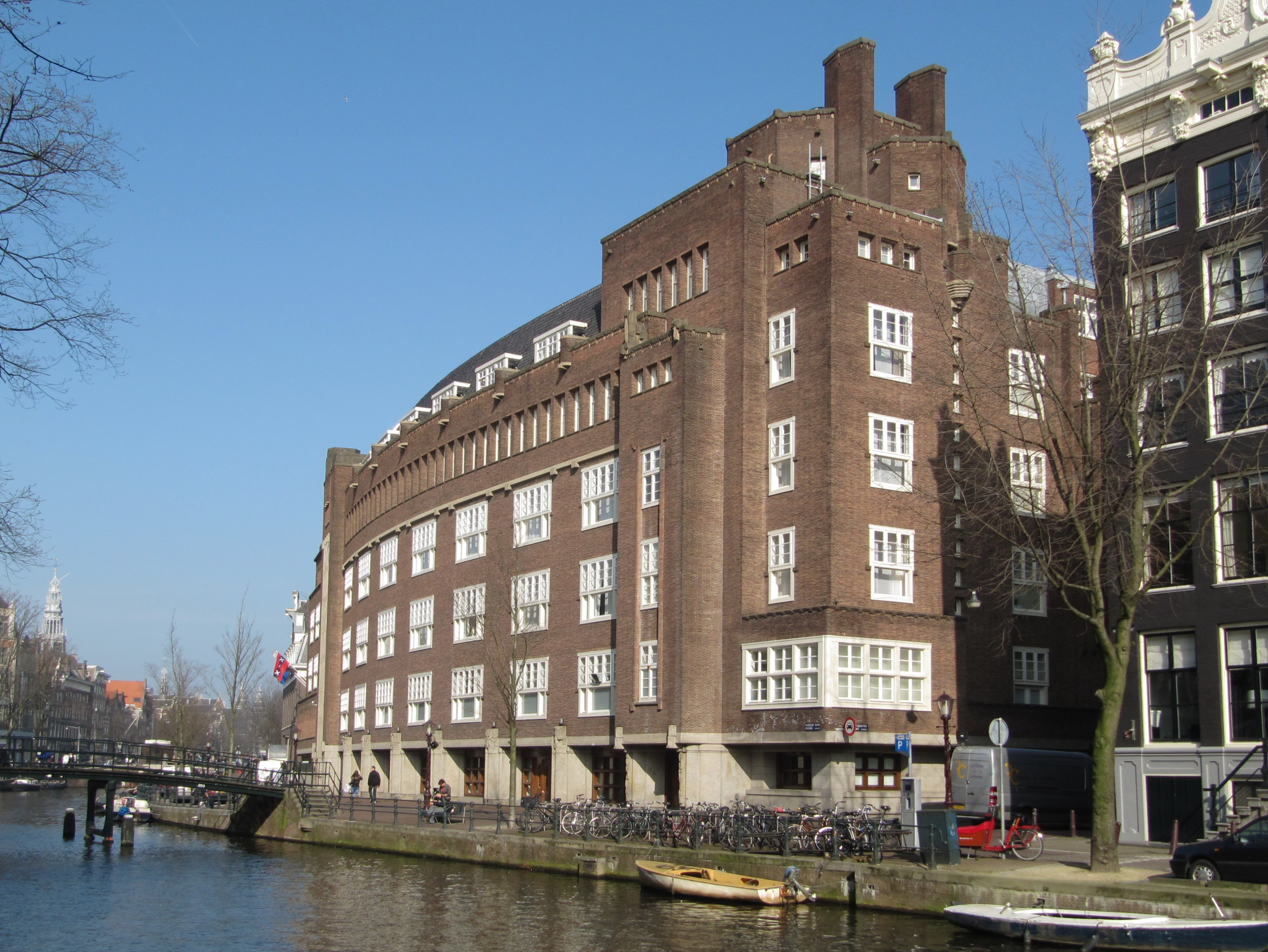 Stadhuis gevestigd in een uit het voormalige St. Ceciliaklooster ontstaan complex dat als logement voor vorsten Prinsenhof heette en van 1656-1795 zetel van de admiraliteit was. Oud zijn van dit complex behalve de ambtswoningen voor zeeofficieren aan de O.Z. Achterburgwala): het in recente tijden geheel uitgebroken, door een schilddak met 2 schoorstenen gedekte hoofdgebouw van de Admiraliteit (1661, door Willem van de Gaffel), waarvan de voorgevel een zandstenen sokkelverdieping en daarboven een ionische reuzenorde met door Jan Gijseling gebeeldhouwd fronton op de middenrisaliet vertoont. In 1926 kwam een uitbreiding van het stadhuis gereed in de stijl van de Amsterdamse School door de gemeentearchitect A.R. Hulshoff.